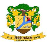 Brasão de Armas do município amazonense de Atalaia do Norte.